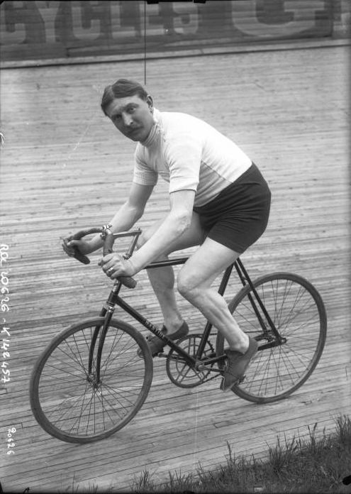 Simar, portrait du coureur sur son vélo, mai 1912